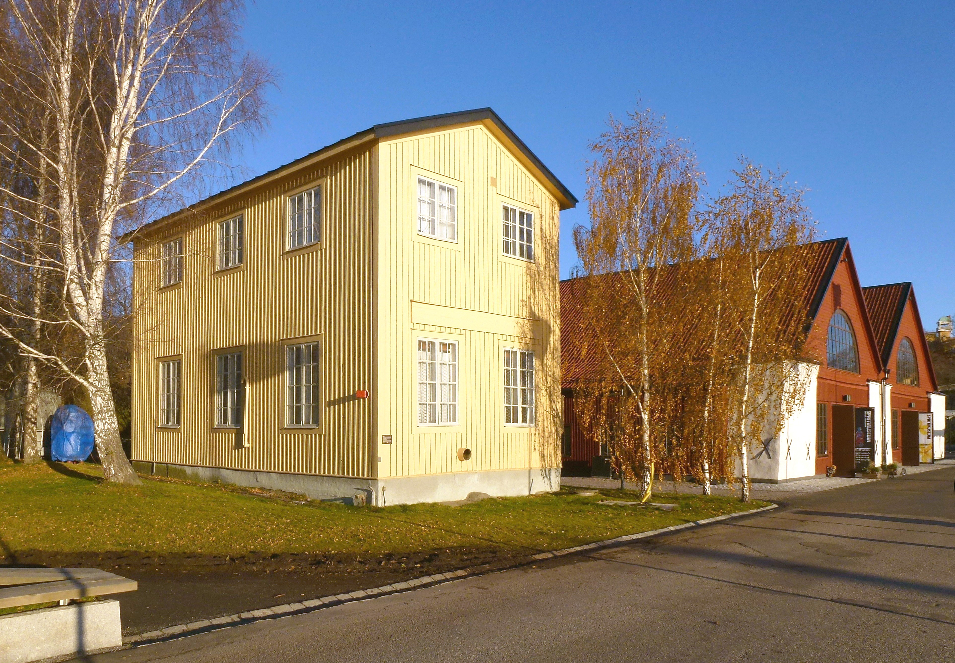 Dyktankhuset på Djurgården, till höger syns huset för "Spritmuseum"